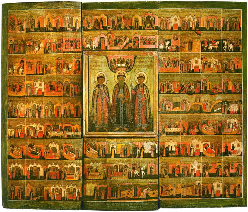 Константин, Михаил и Федор Муромские: с житием в 87 клеймах. 1714 г. МИХМ. Инв. М-6604. 199,5х250,5 см. Пост. из Благовещенского мужского монастыря. Находилась в притворе собора. Пост. в 1940 г. Реставрирована в 1940 и 1944 г. в Муромском музее И.И.Тюлиным.